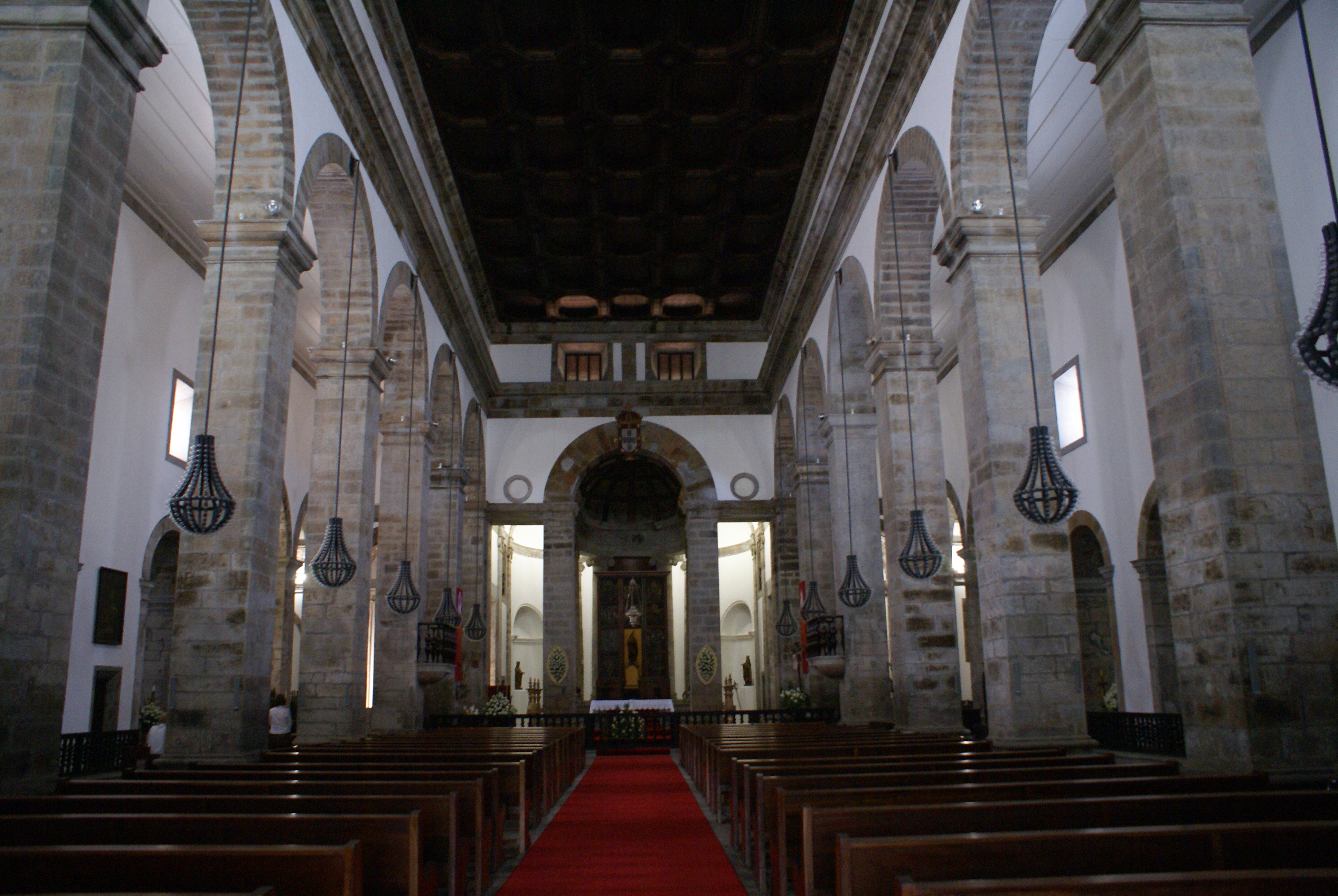 Nave central da Sé Catedral de Angra do Heroísmo, Açores, Portugal.